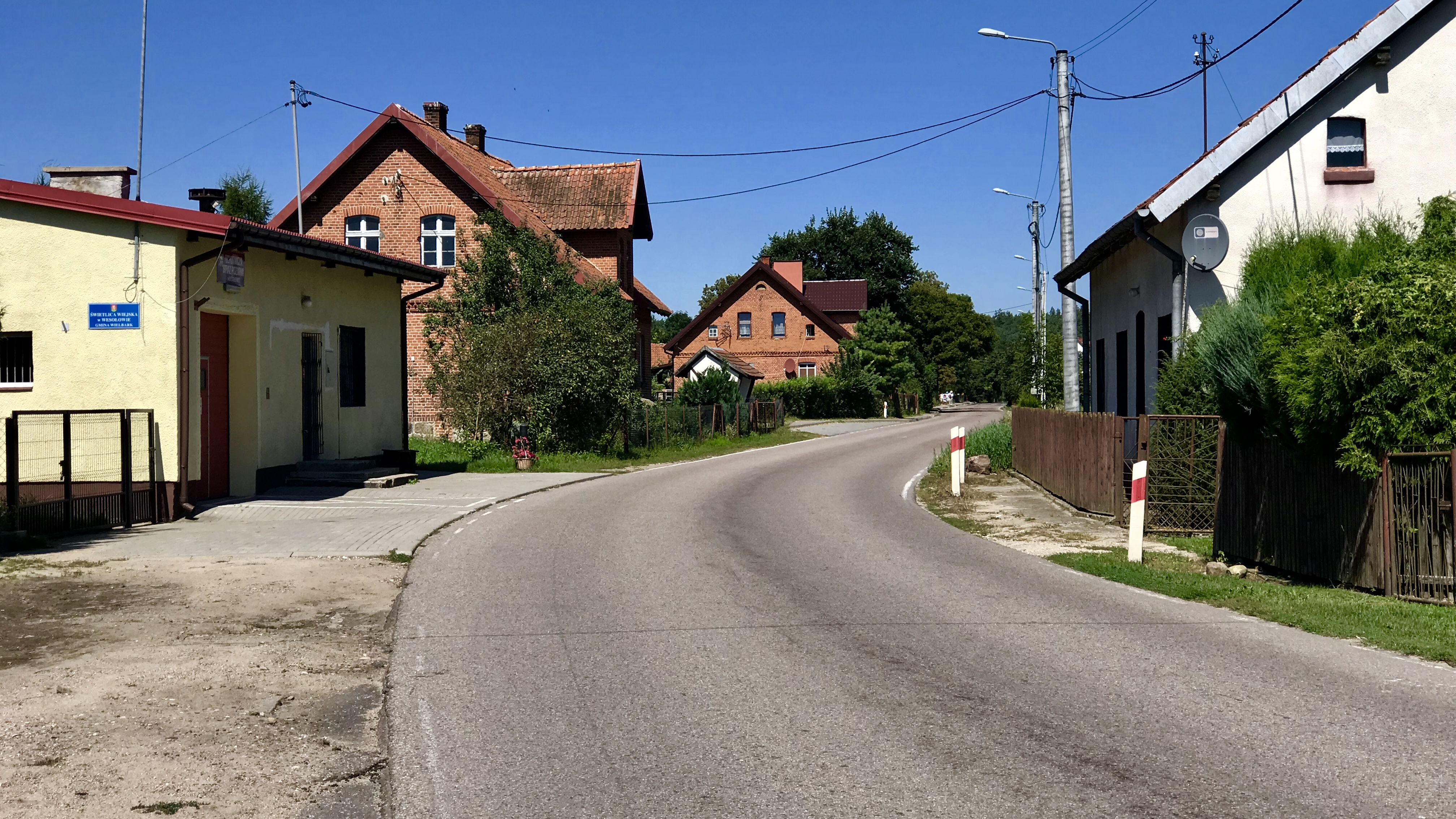 Centrum Wesołowa